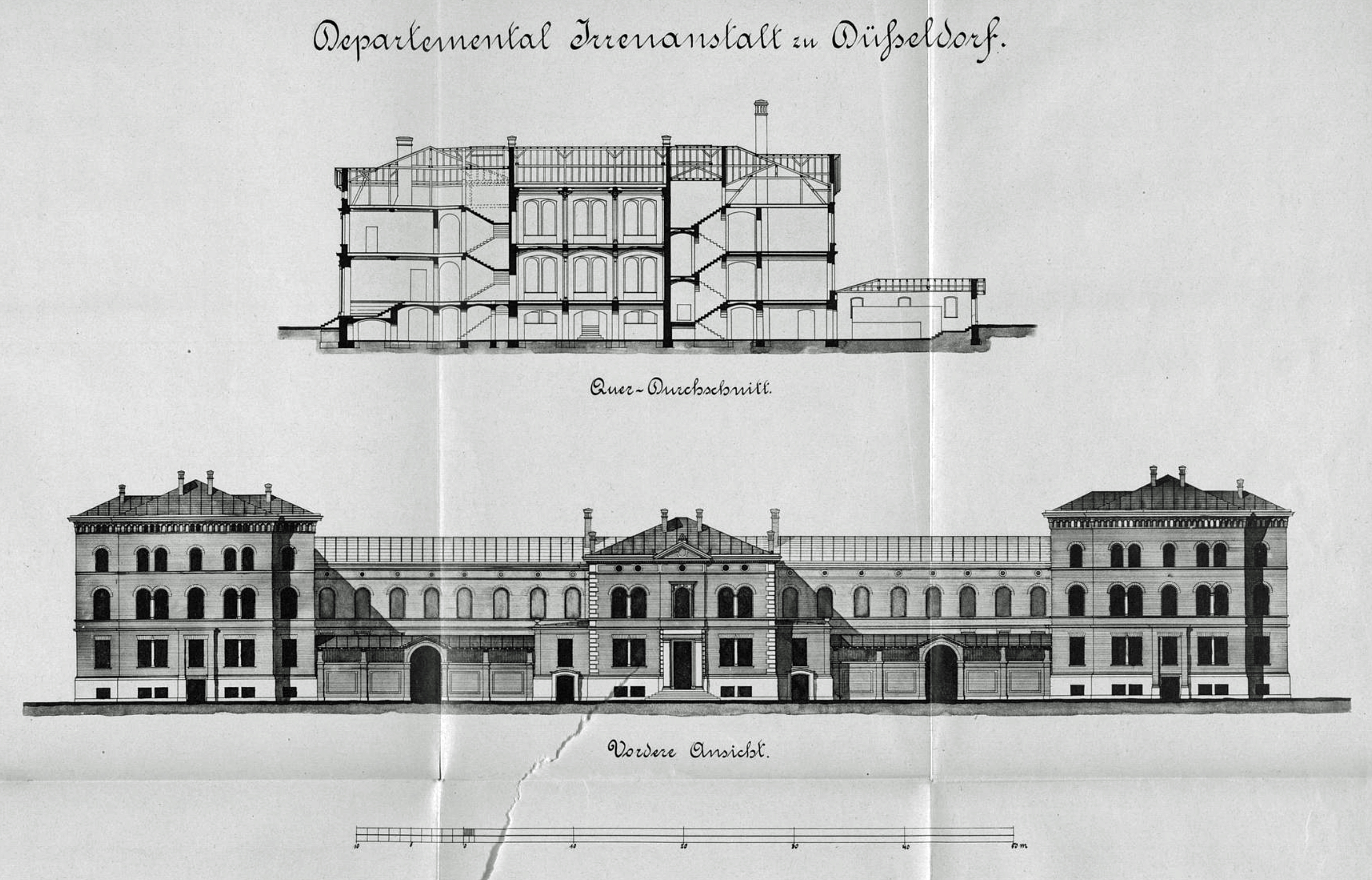 Departemental-Irrenanstalt zu Düsseldorf, Querschnitt und Vordere Ansicht, 1864